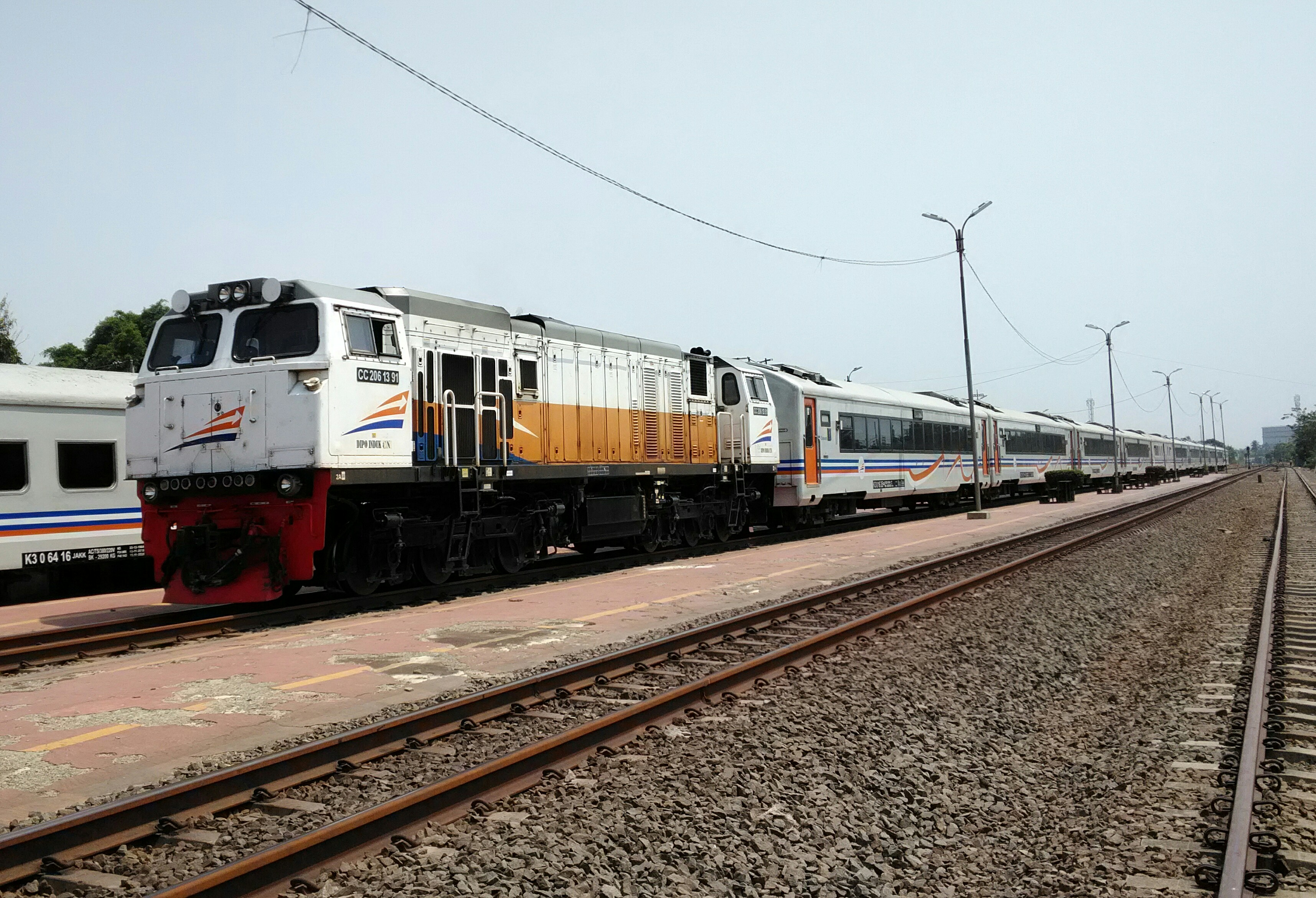 KA Argo Cheribon melintas langsung Stasiun Dawuan Sunda: KA Argo Cheribon ngaliwatan Stasion Dawuan